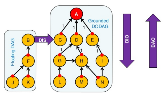 Mensajes ICMPv6 RPL: DIO, DAO Y DIS